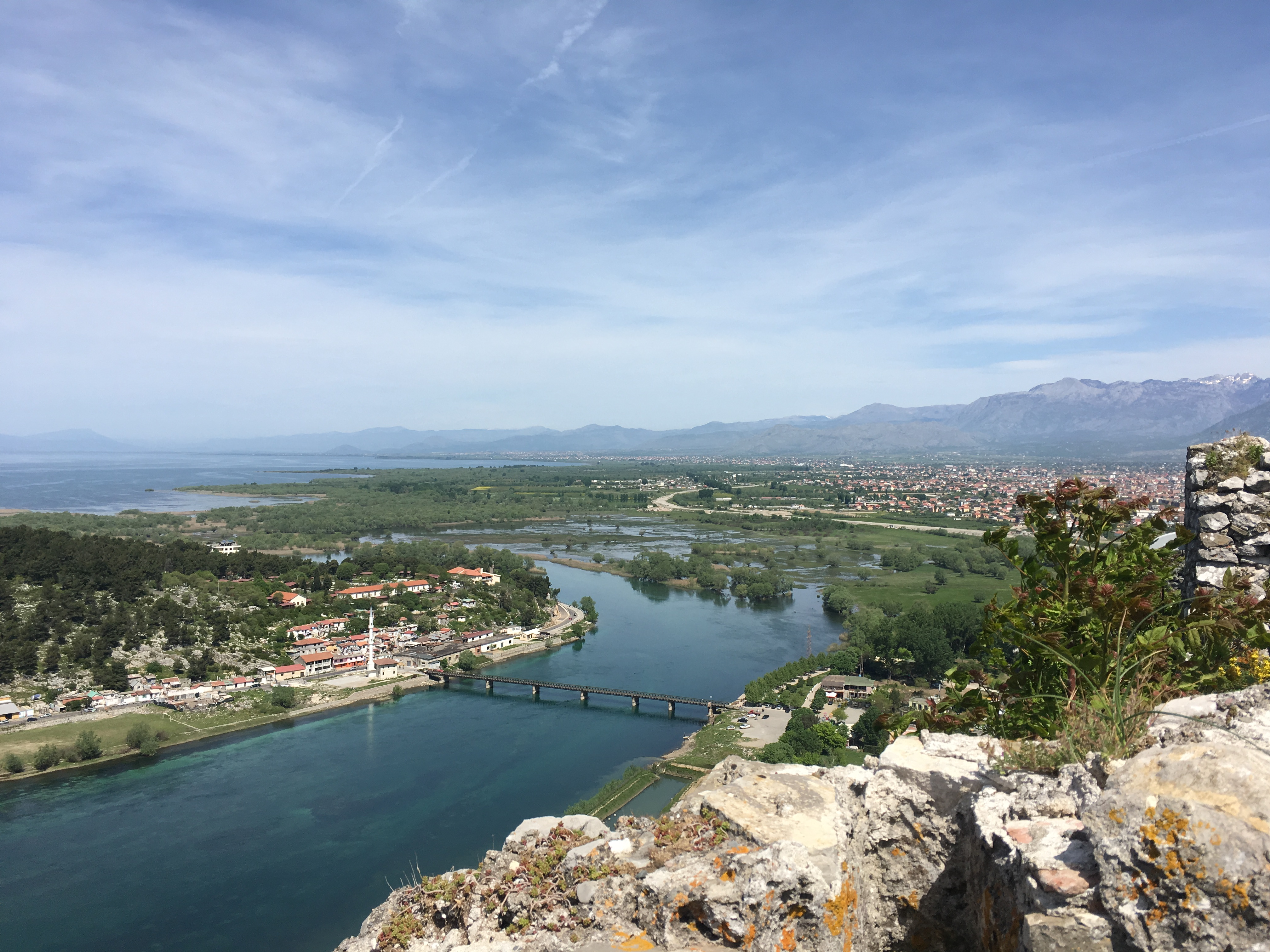 Liqeni i Shkodres, Shkoder, (Dalja e lumit te Bunes nga Liqeni i Shkodres)